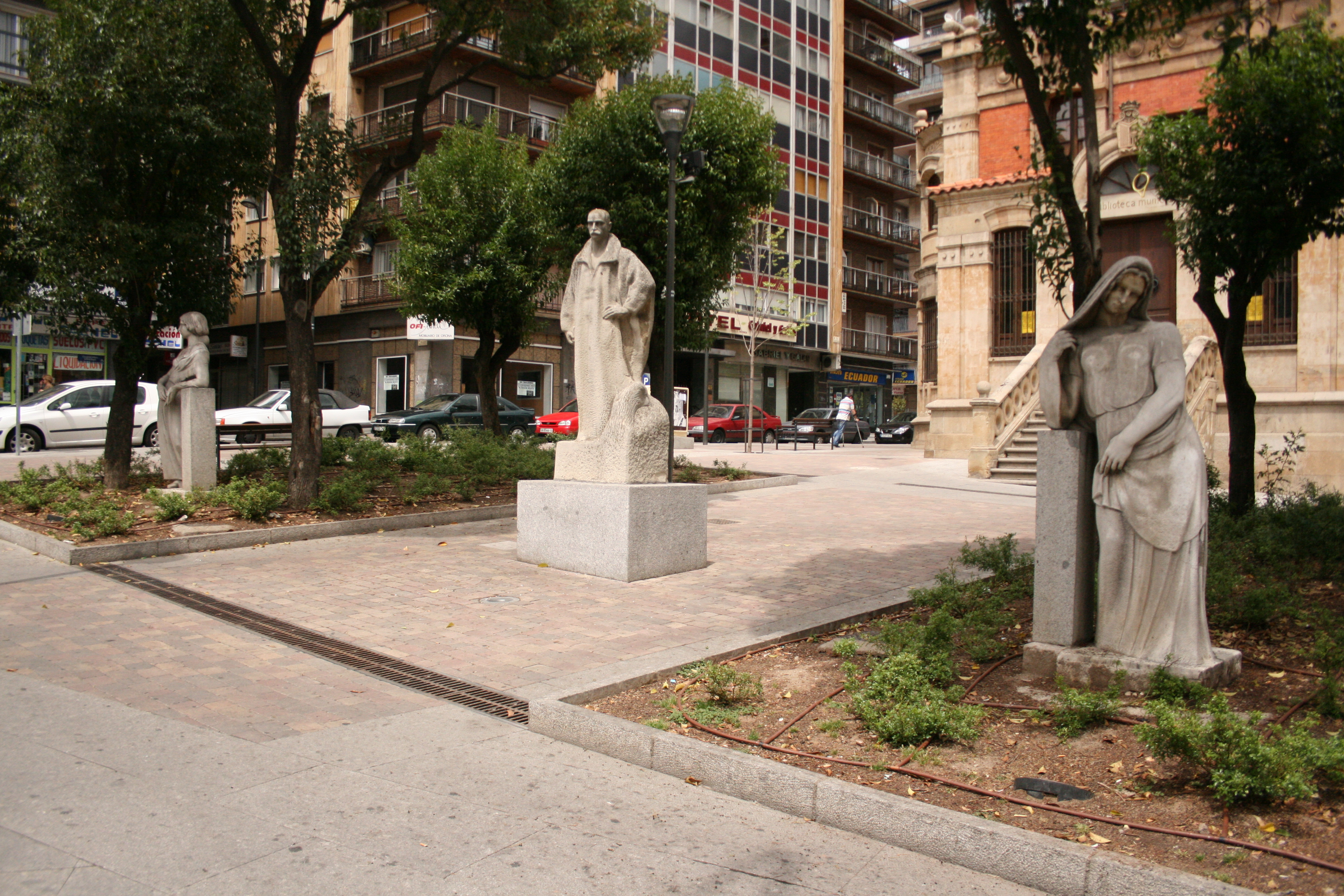 Estatua de José María Gabriel y Galán (Salamanca)